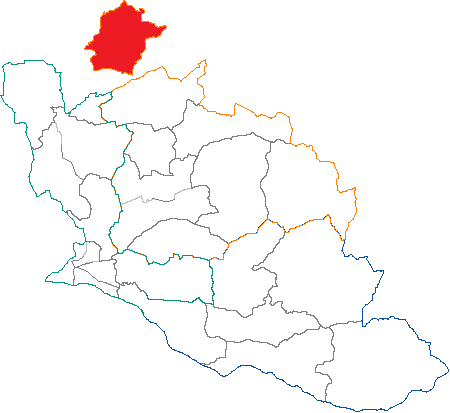 Situation du canton dans le département de Vaucluse (France)